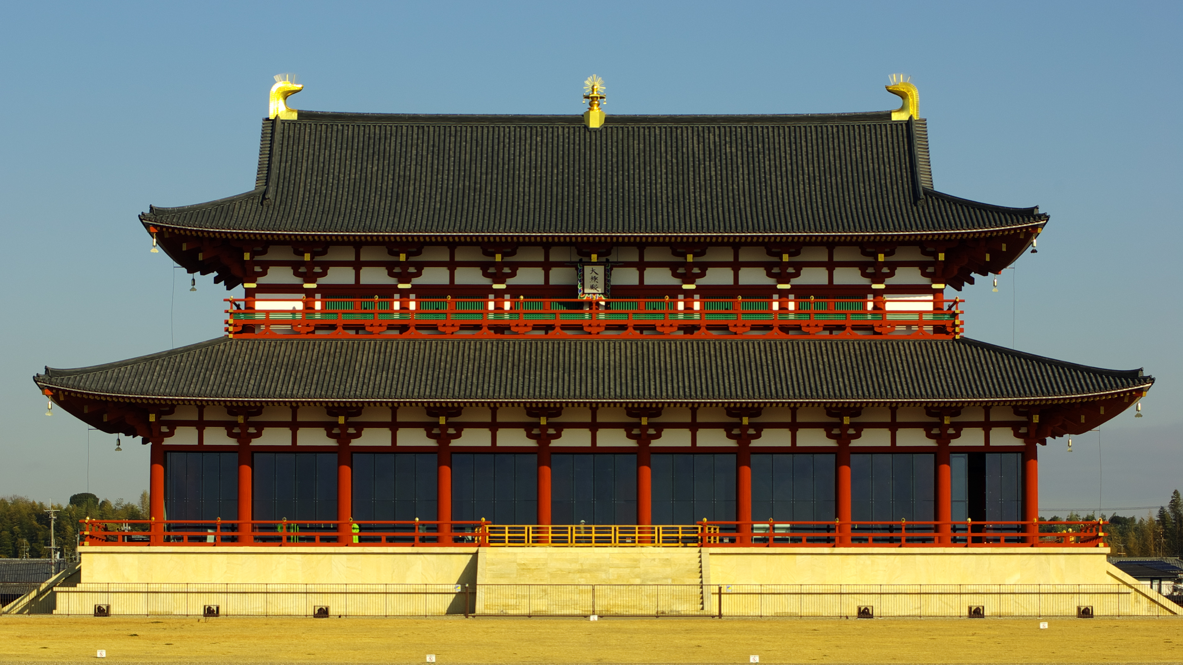 平城宮第一次大極殿（復元）正面視。16:9にトリミング。